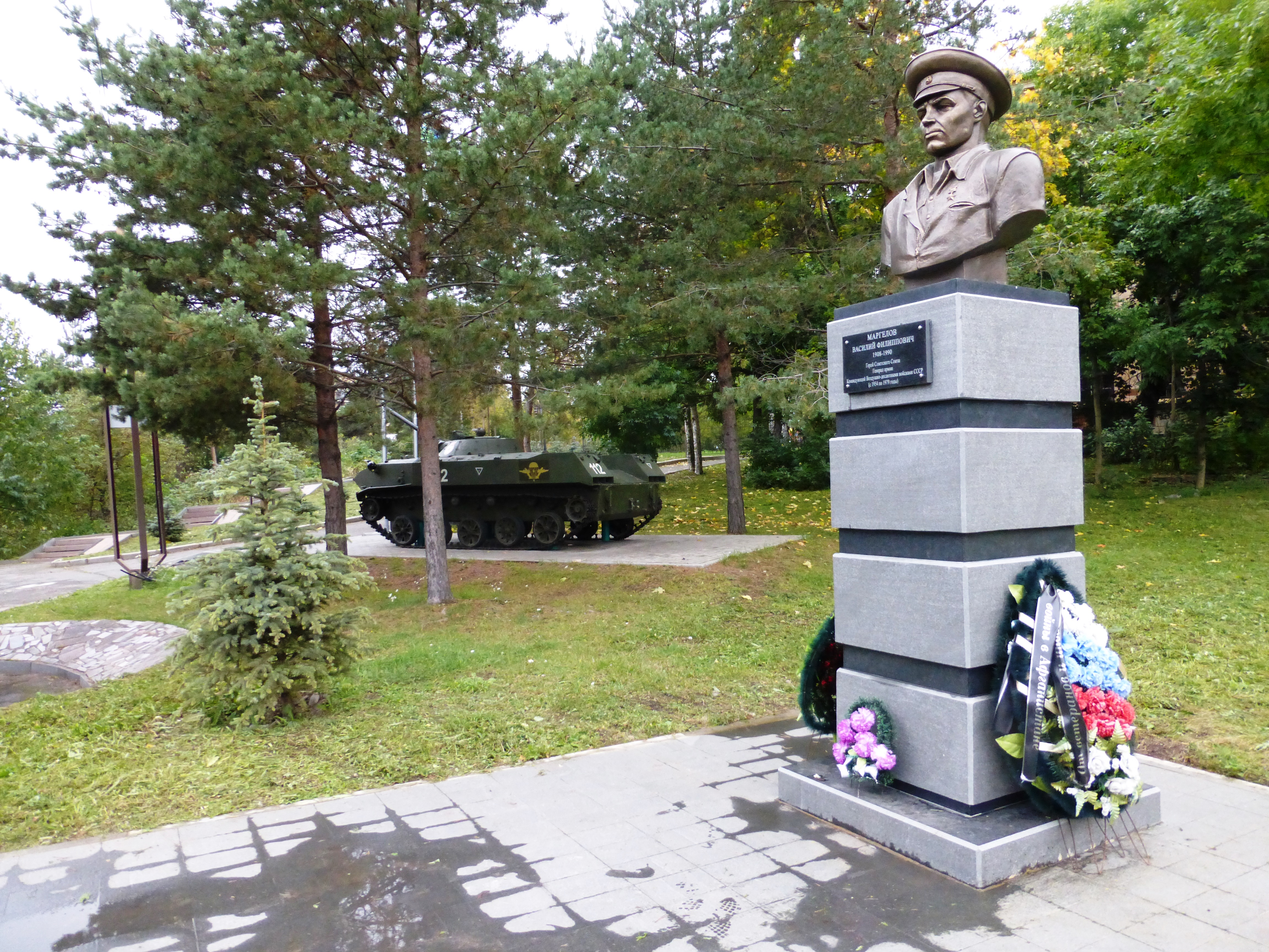 Фрагмент мемориала воинам-интернационалистам «Черный тюльпан» в Петрозаводске в сквере на ул. Антикайнена. Бюст генералу армии, командующему ВДВ Маргелову В. Ф.